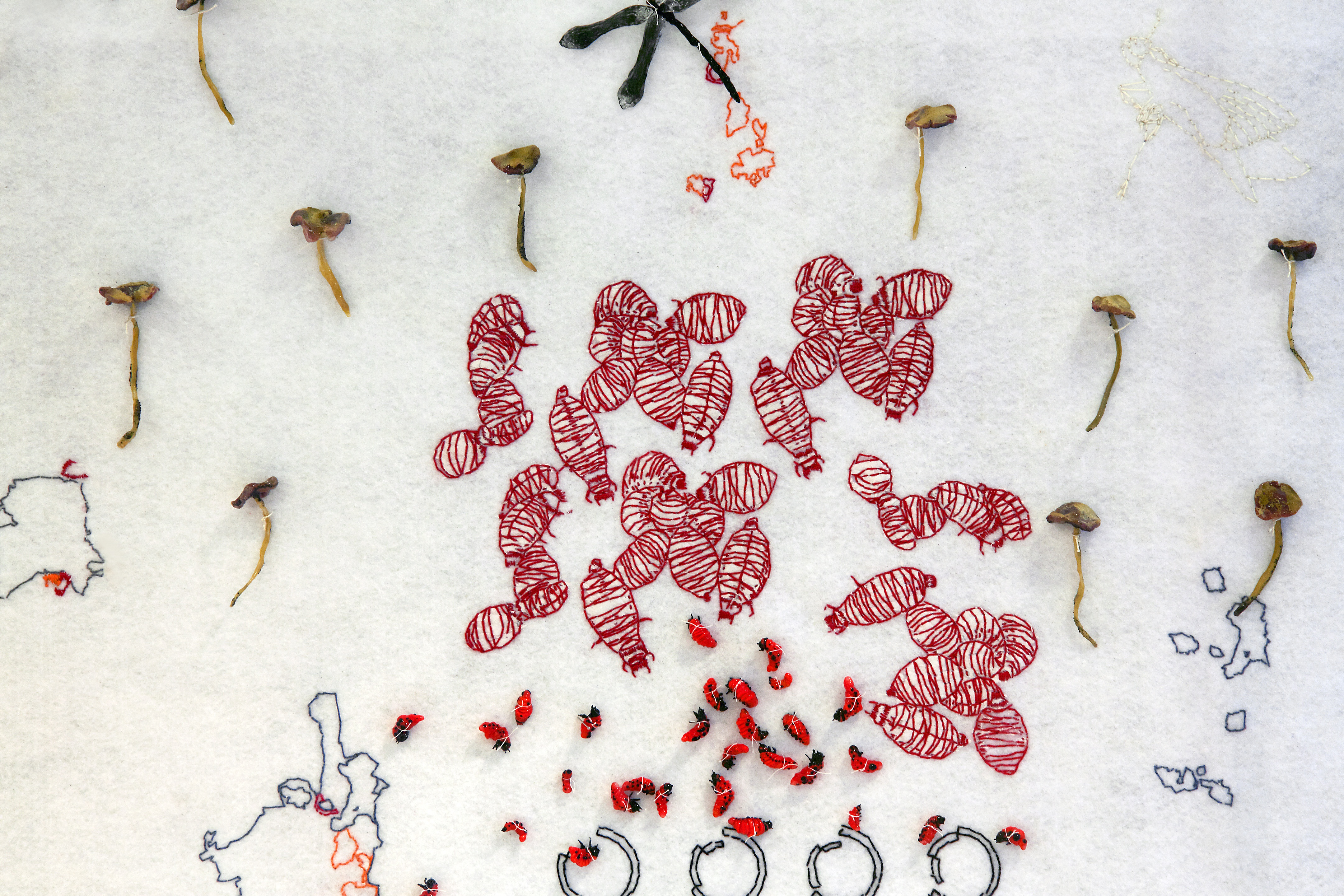 .צמחים פולשים,זכוכית,רקמה ,נייר אורז